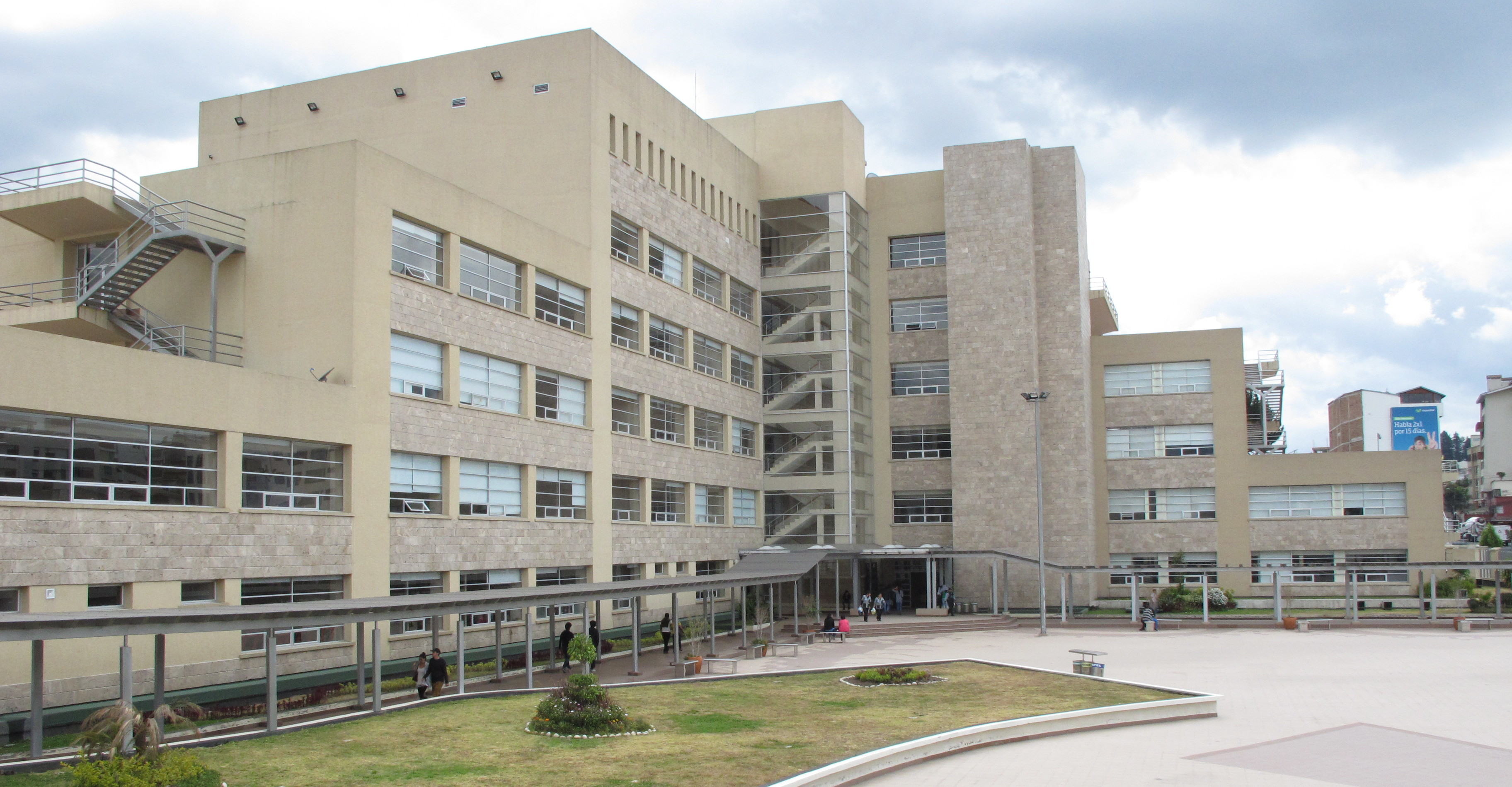 CEC EPN Building - Classroom at Escuela Politécnica Nacional Quito, Ecuador.